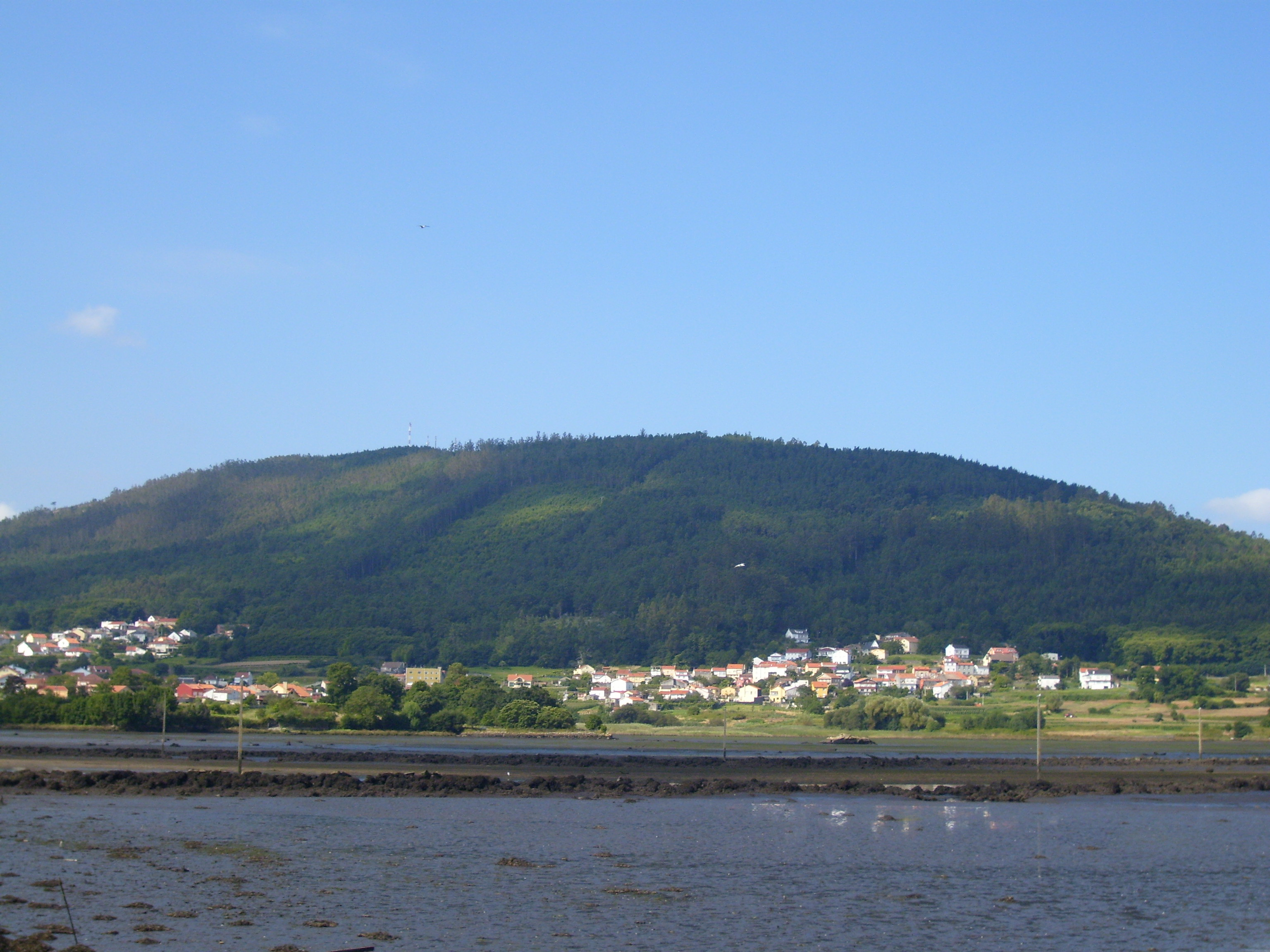 Monte do San Lois, Noia, A Coruña